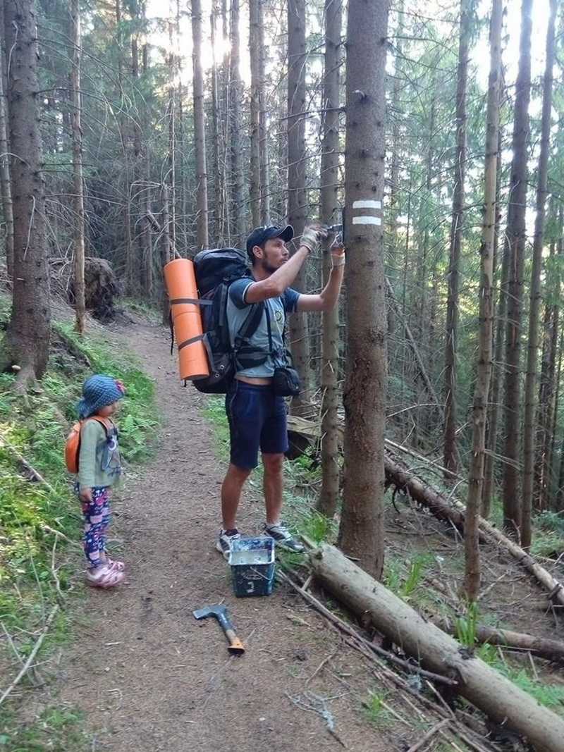 Василь Фіцак маркує стежки